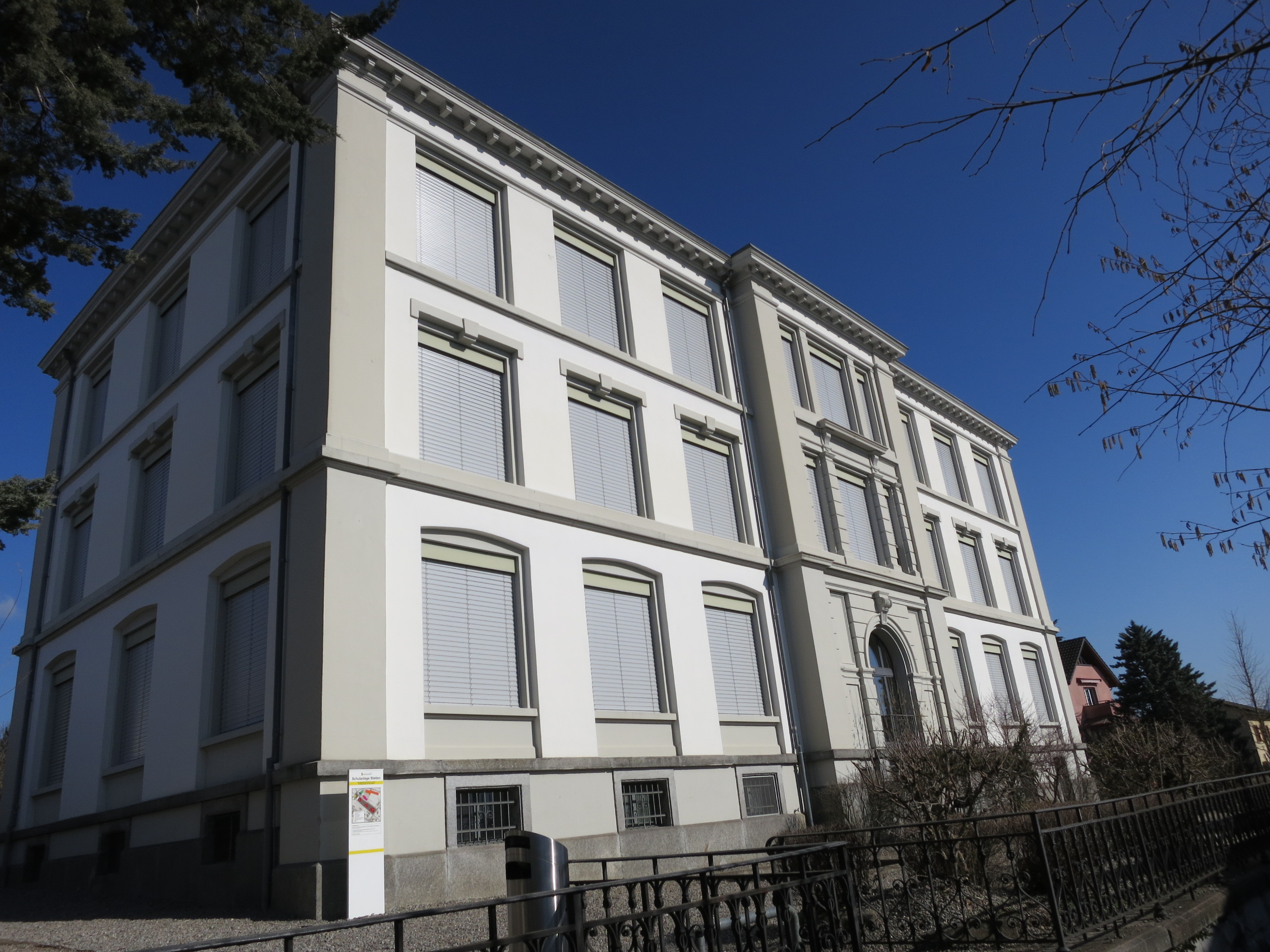 Primarschulhaus Blatten, Männedorf ZH, Schweiz